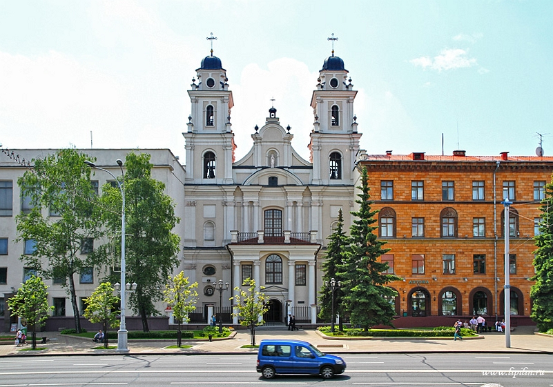 Мінск. Архікафедральны касцёл Імя Найсвяцейшай Панны Марыі This is a photo of Belarusian heritage monument. Reference number: 712Г000235 ( WLM)